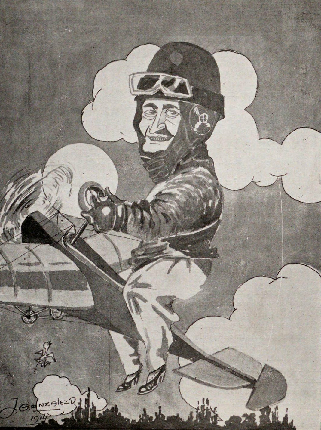 Caricatura de Silvio Pettirossi en su visita a Chile en 1914. Silvio Pettirossi fue un pionero de la aviación. Nació en Asunción, Paraguay, el 16 de junio de 1887. Murió el 17 de octubre de 1916 durante un vuelo en el que verificaba las reparaciones hechas a su avión. En Boletín del Aero-Club de Chile